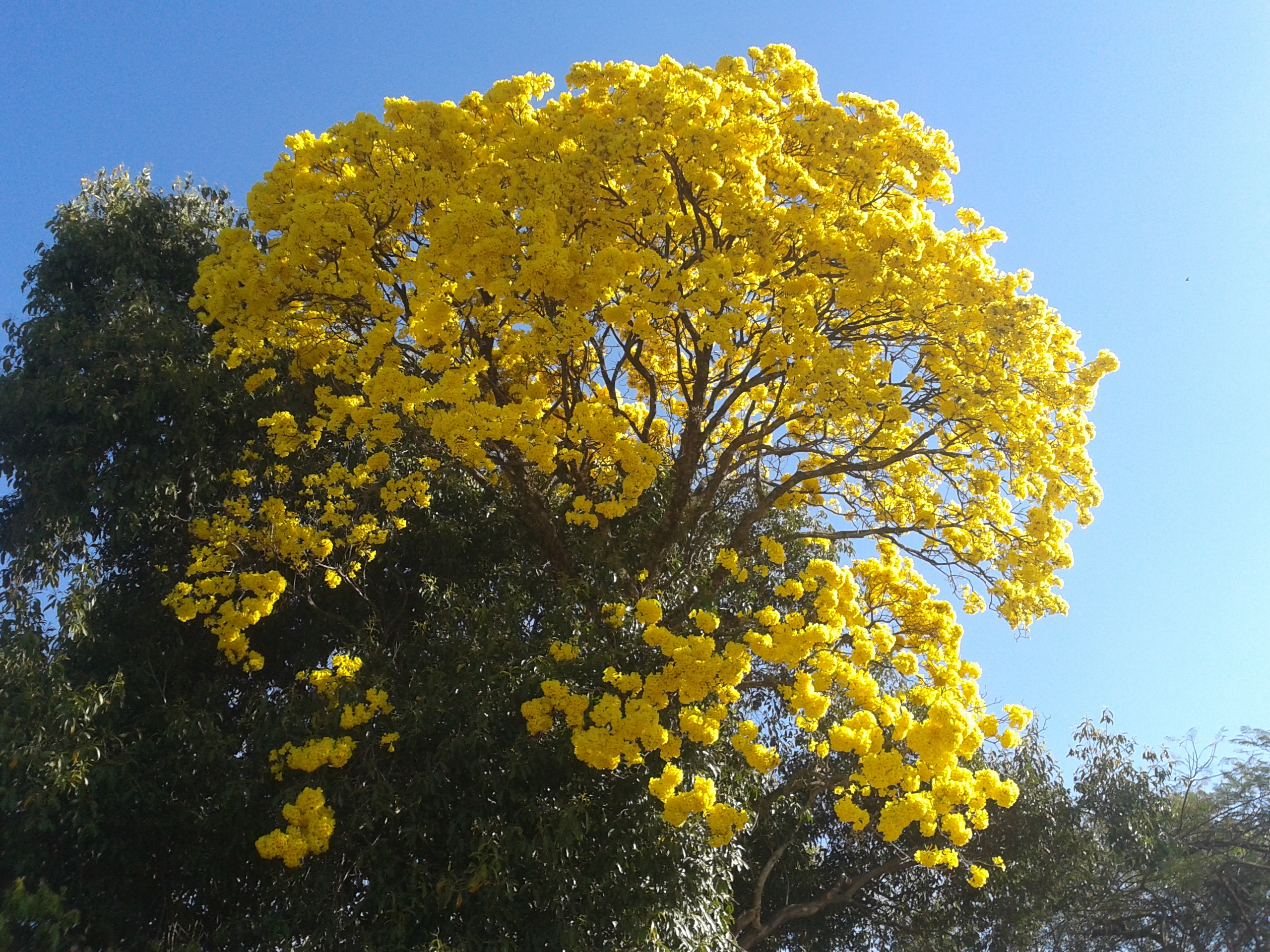 Ipê-amarelo na cidade de Descalvado